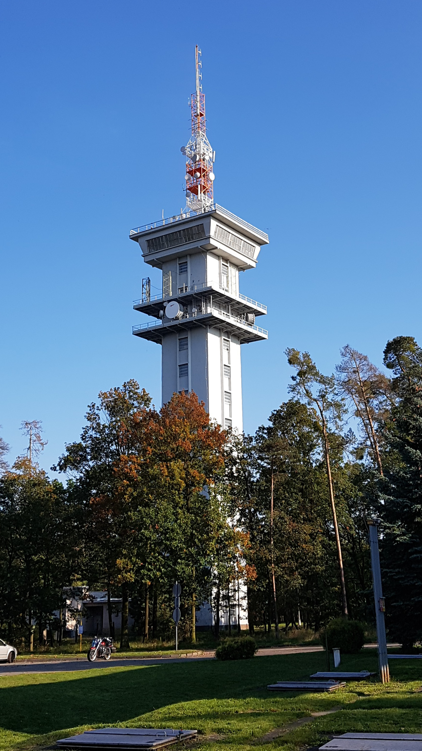 Vysílač Hradec Králové – Hoděšovice. Pohled od motorestu Koliba